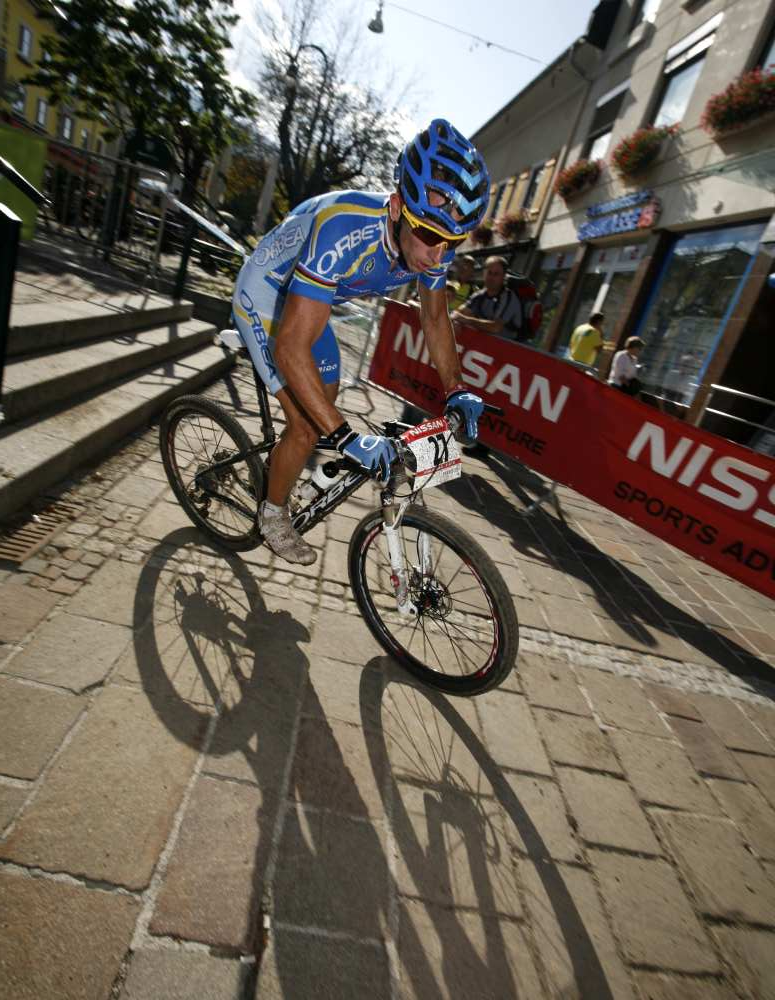 Mountainbike Worldcup